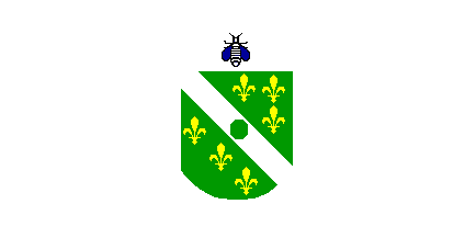 Flag of Република Западна Босна